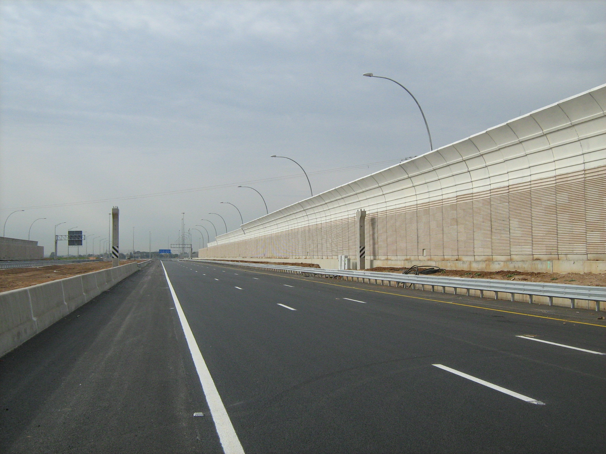 כביש 431 - בידוד אקוסטי בין ג'ואריש לישרש